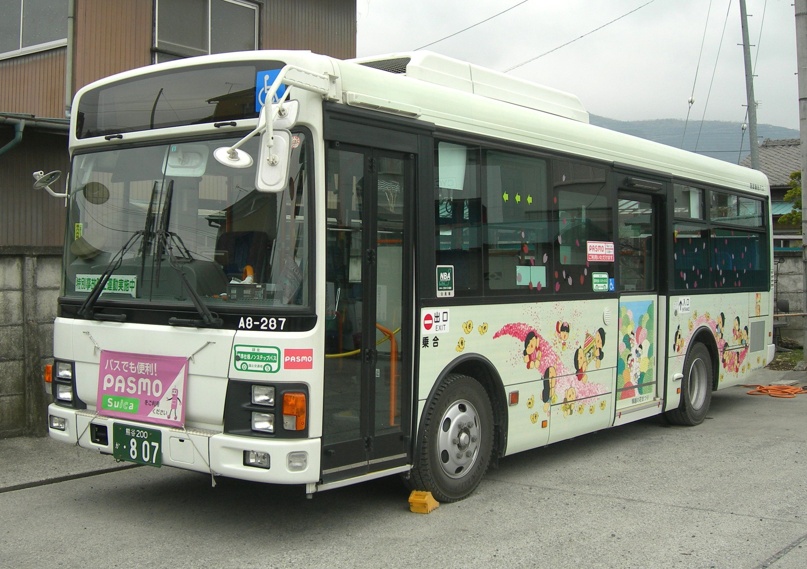 西武観光バス